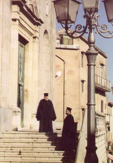 La Cattedrale di Piana degli Albanesi con i papàdes (sacerdoti albanesi di rito bizantino: Papa Jani, Papa Gjergji).